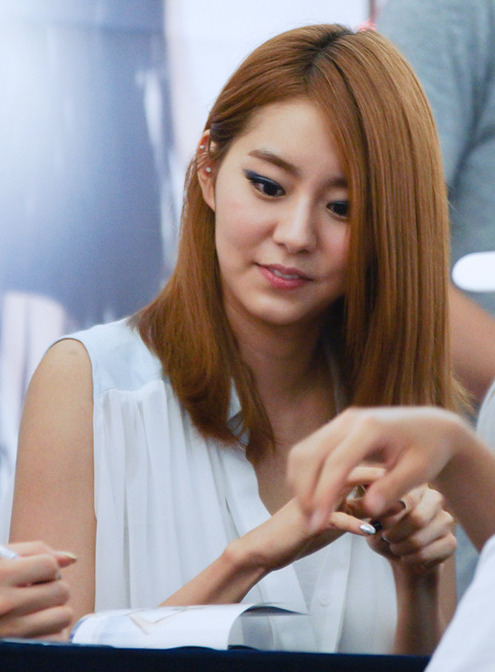 2012년 7월 1일 영등포 타임스퀘어 핫트랙스 팬사인회에서.